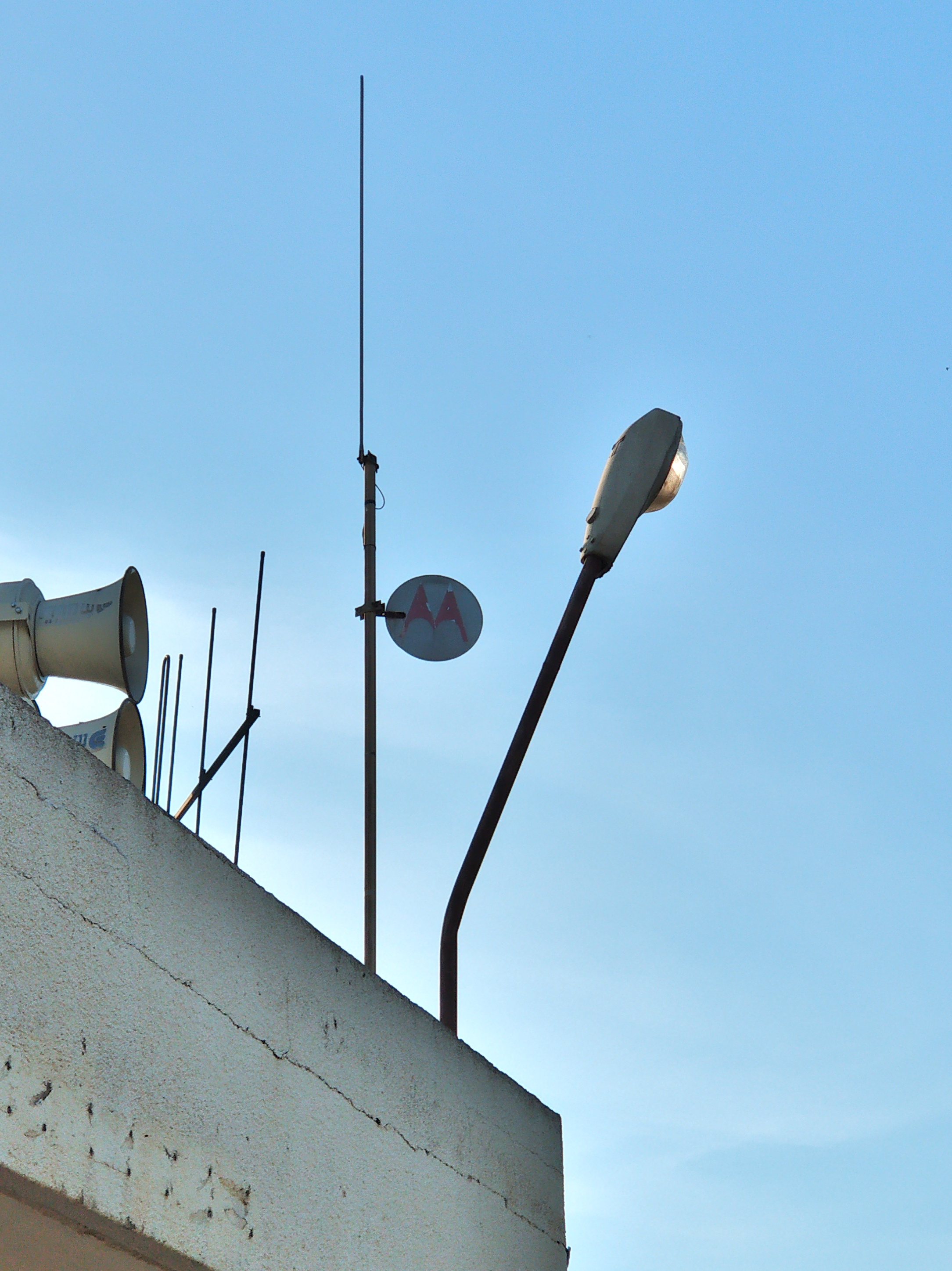 אנטנת מוטורולה דור ראשון